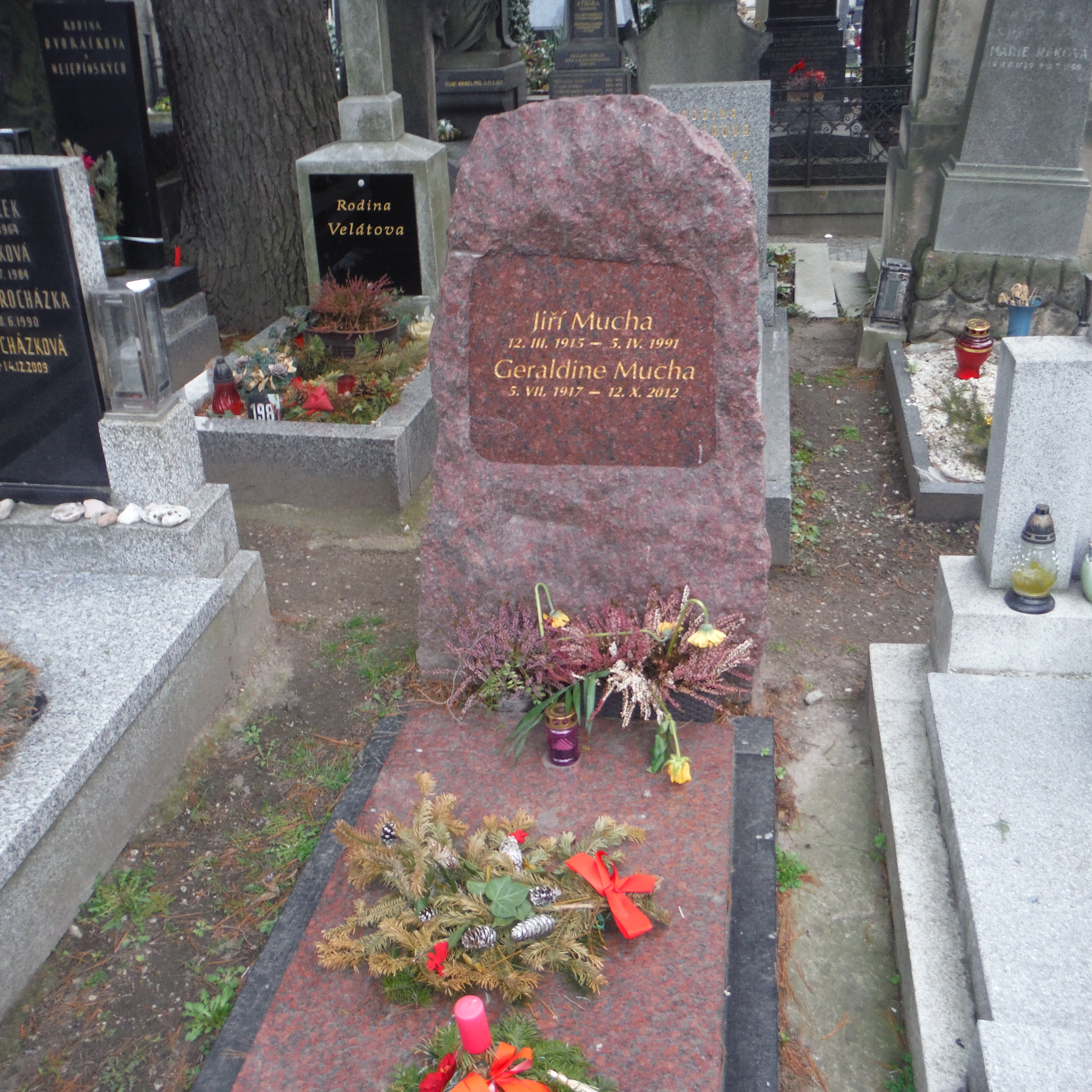 hrob